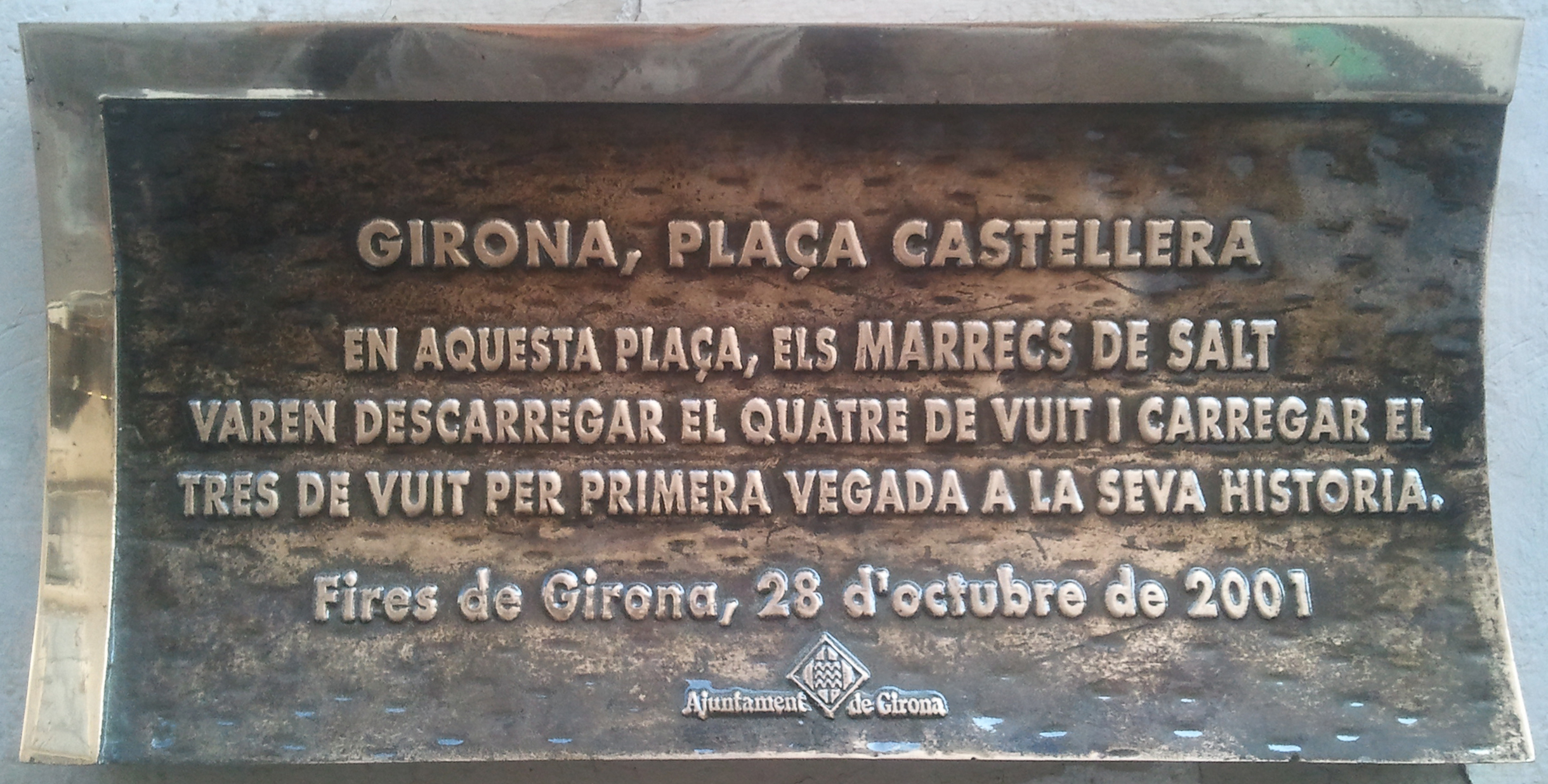 Placa dedicada als Marrecs de Salt a la Plaça del Vi en motiu del seu primer 4 de 8 descarregat i 3 de 8 carregat el 20 octubre de 2001